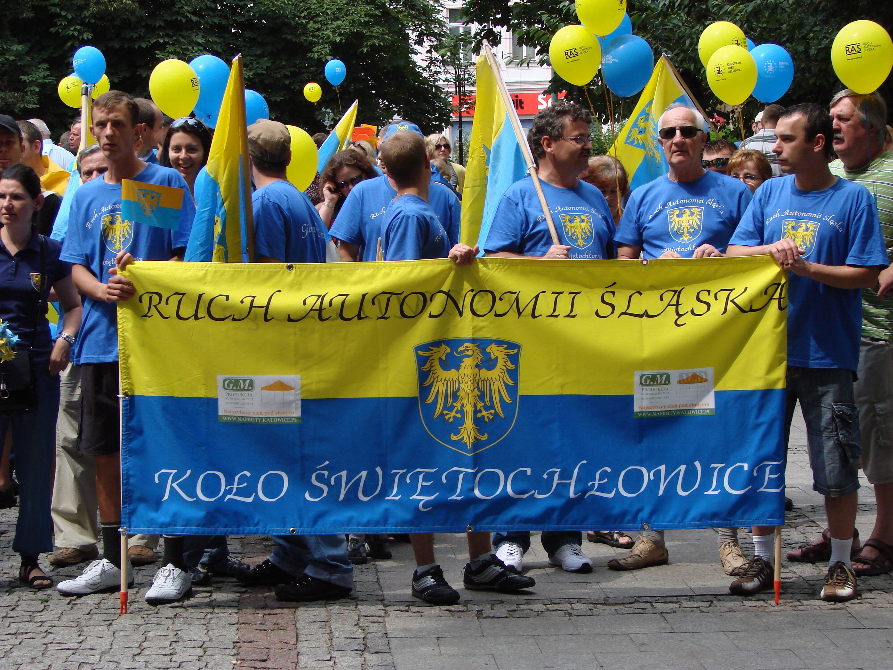 Ruch Autonomii Śląska-organizacja